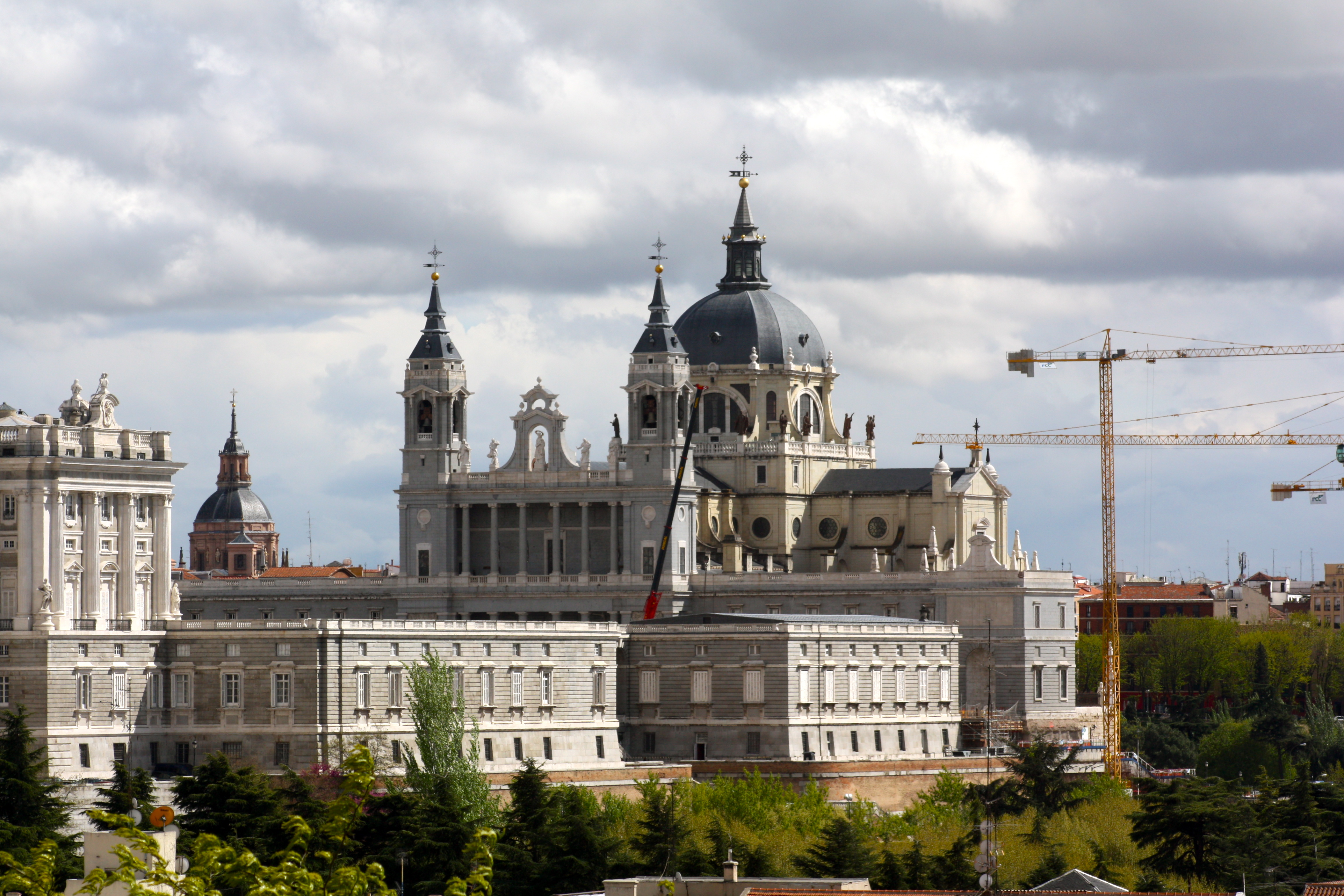 Madrid Dos - 22